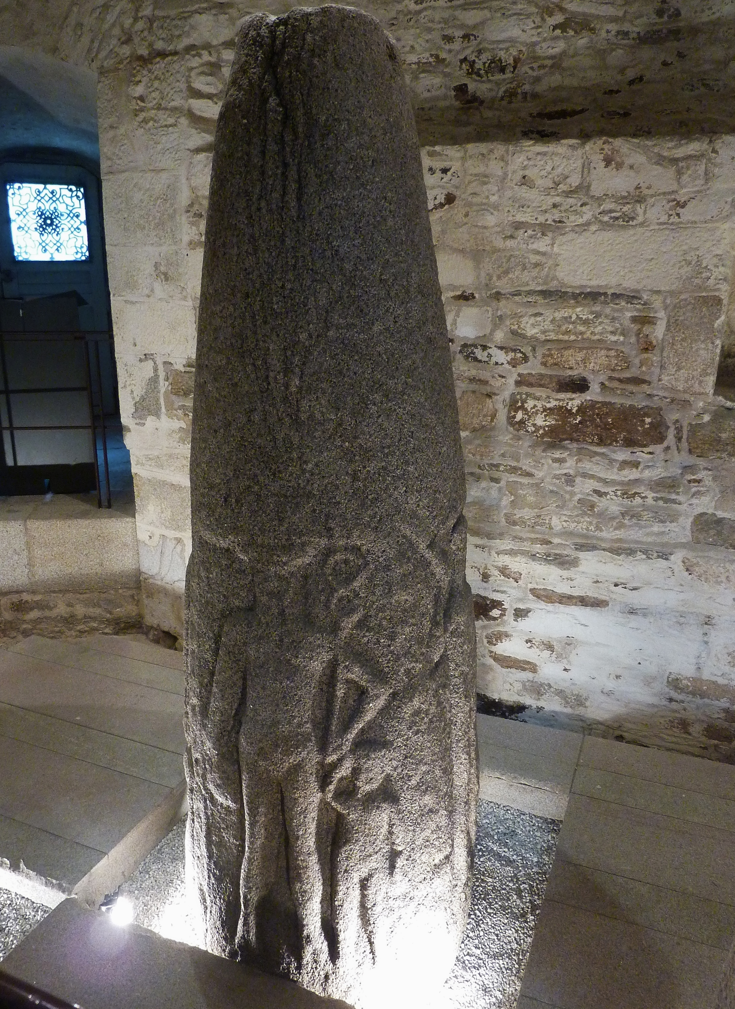 Stèle gauloise romanisée dite "pierre aux quatre dieux" datant de l'âge du fer avec un réemploi sous le Haut-Empire (170-248 après J.-C.) qui se trouvait à Kervadol en Plobannalec (désormais en dépôt au Musée breton de Quimper)